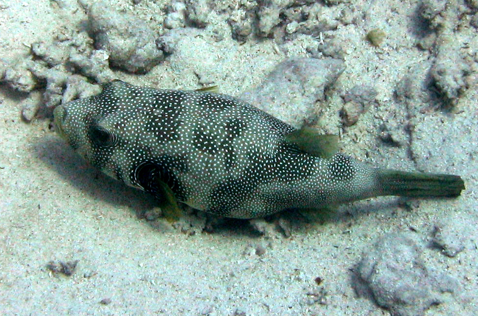 Arothron hispidus Egypte 2006, A. LAYDIER